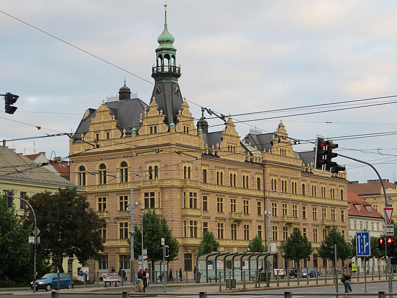 Západočeská Univerzita V Plzni